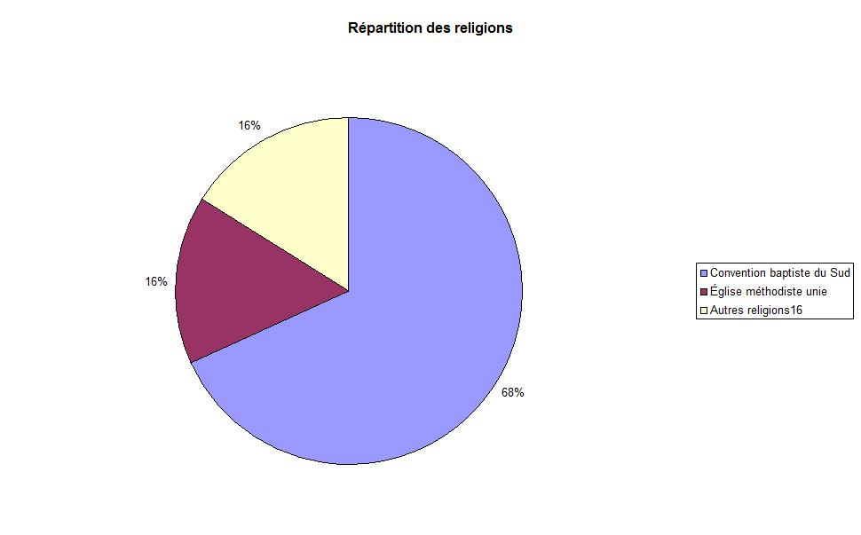 Répartition des appartenances religieuses à Dudley (Géorgie, Etats-Unis) en 2008